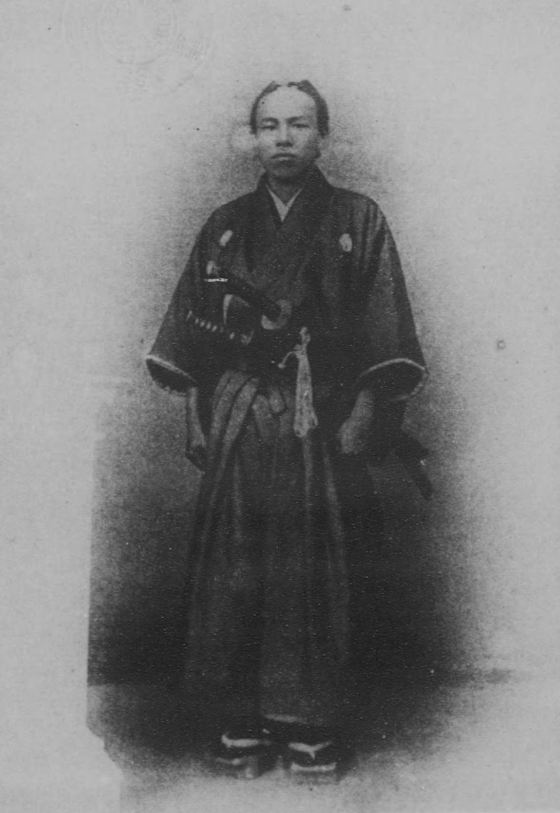 a Japanese man 大隈重信 (Shigenobu Okuma)